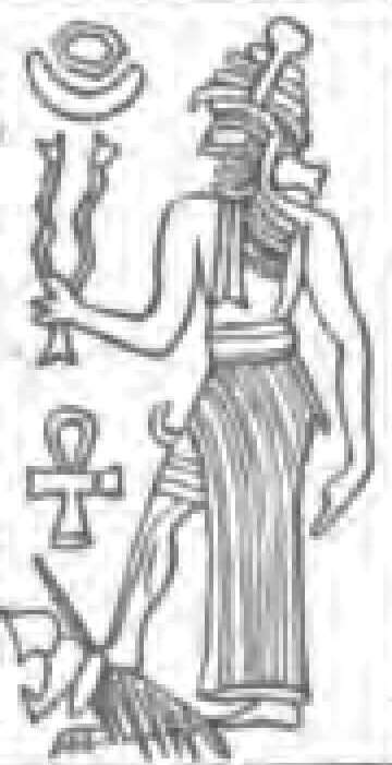 Babylonisches Rollsiegel von Hali, Sohn des Paškia, des Sklaven des Gottes Adad. Ausschnitt: Adad mit Blitzbündel unter Mondsichel und Sonne.